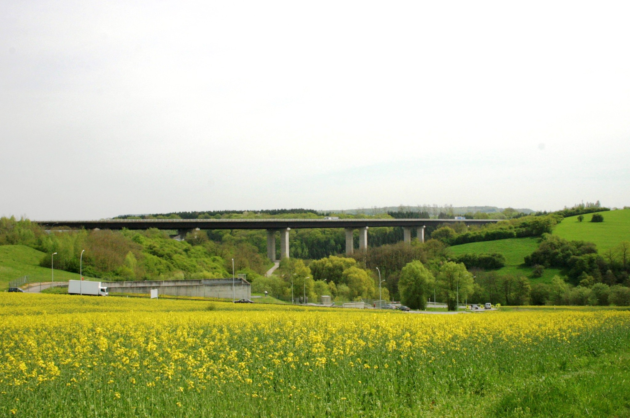 De Viaduc op der Wollefsmillen